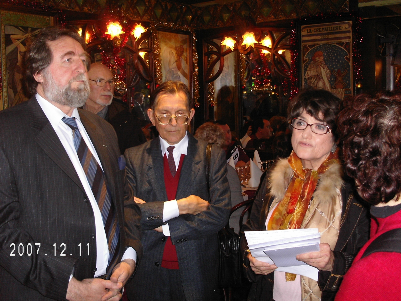 Момент от тържествената церемония по приемането на Кирил Кадийски в международната академия "Монмартър"